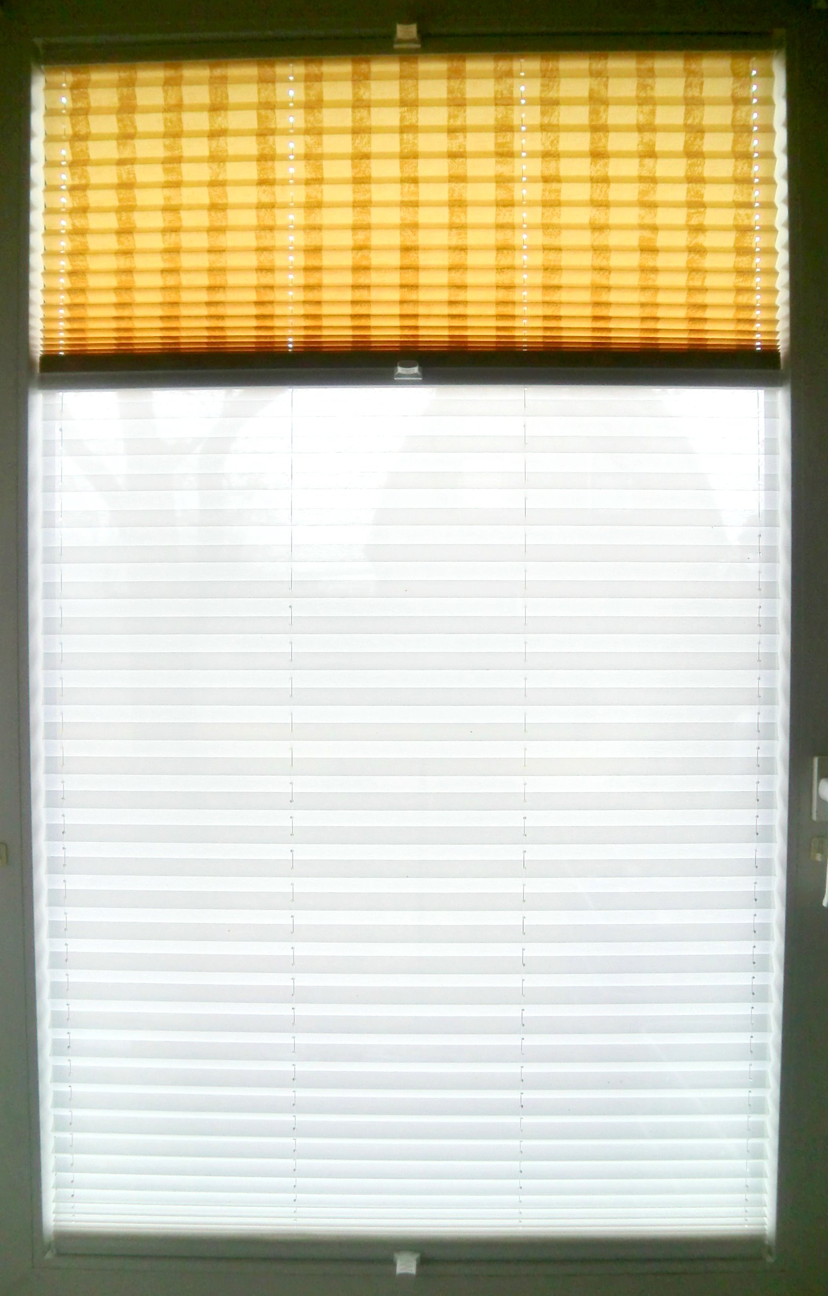 Plisseeanlage, System: Cosiflor, Typ VS 3, Hersteller: Meiwi-Jalousien Hohendodeleben, Sachsen-Anhalt, Deutschland